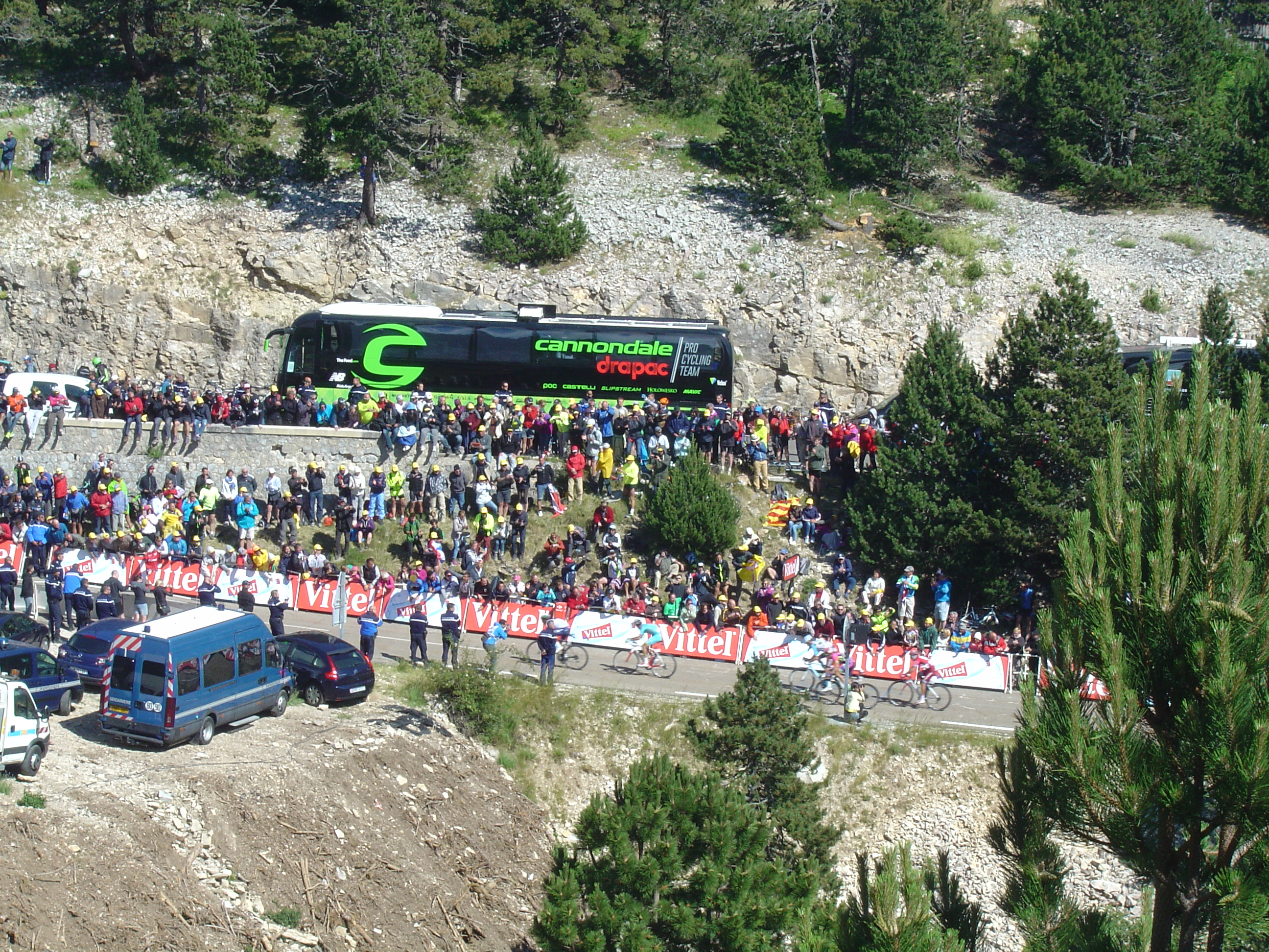 Arrivée d'un groupe de favoris avec notamment Romain Bardet au Chalet Reynard (1417m) lors de la douzième étape du Tour de France 2016